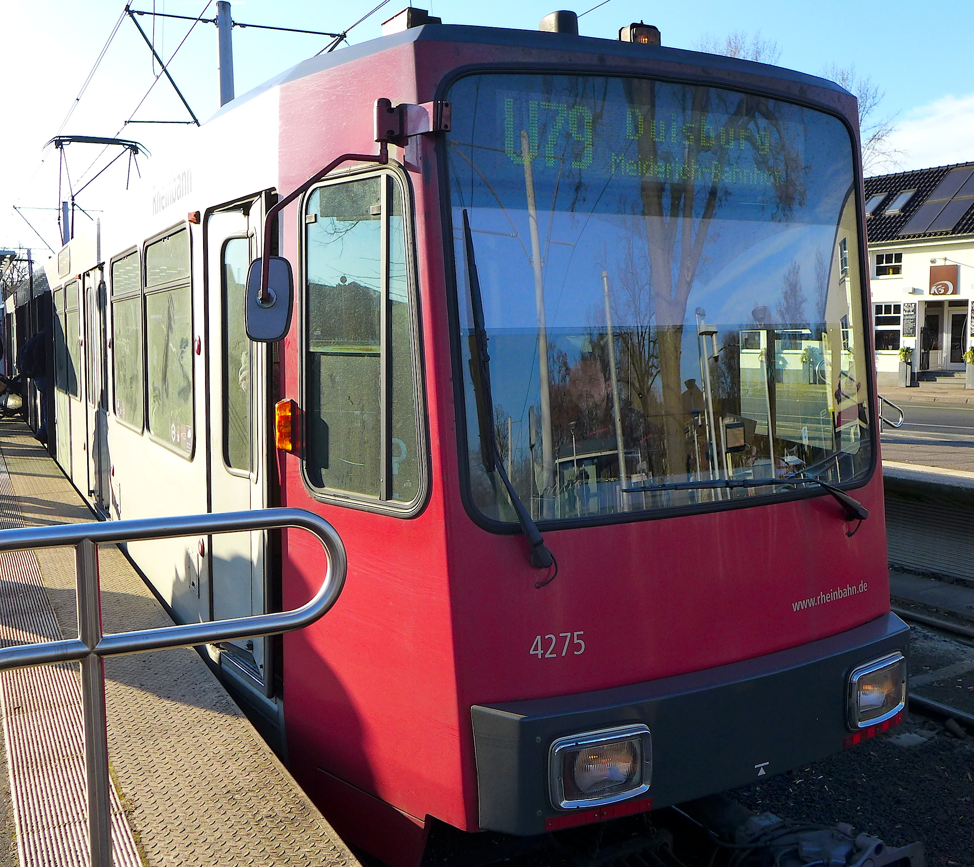 Трамвай в Дюссельдорфе.17 января 2017.